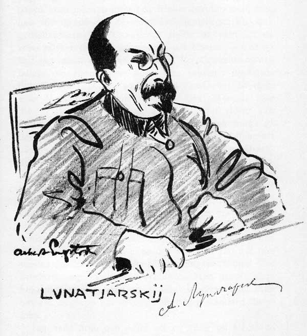 Anatoly Lunacharsky, Anatolij Lunatjarskij, Анато́лий Васи́льевич Лунача́рский